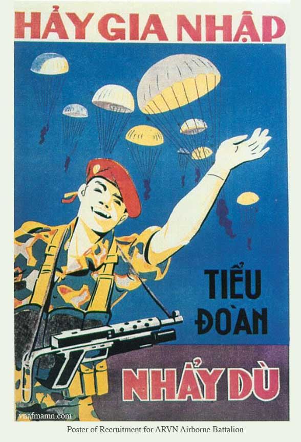 The photo of the Republic of Vietnam Airborne Division.